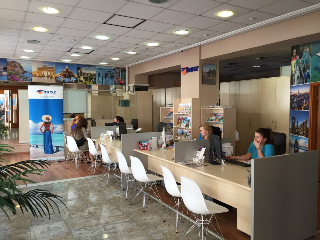 A fénykép a székesfehérvári IBUSZ irodában készült 2018 szeptemberében, hogy az IBUSZ Utazási Irodák Kft. Wikipedia szócikknél illusztrálja a mai állapotokat.